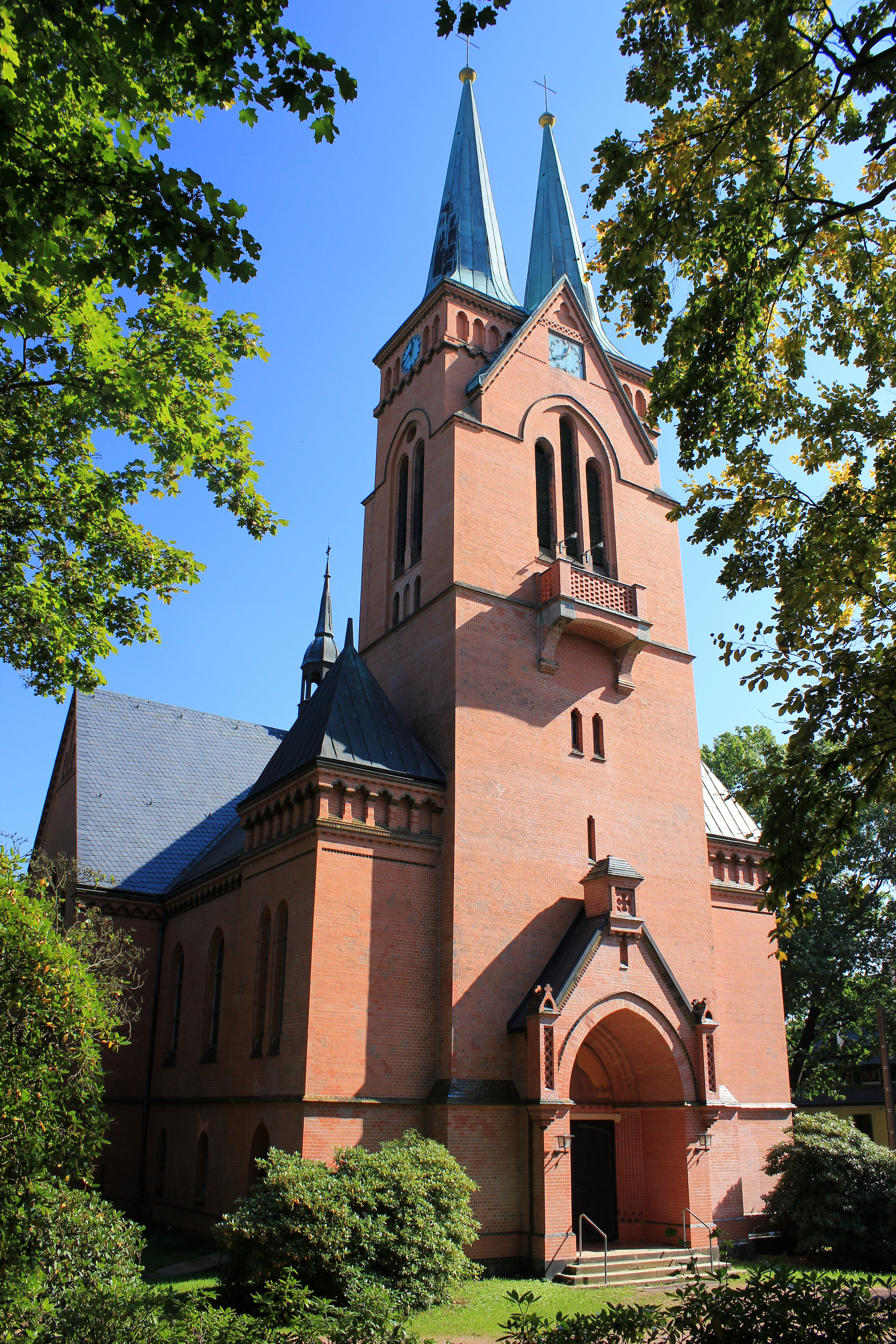 Ev. Luth. Kirche in Niederwürschnitz. Erzgebirgskreis. Sachsen.